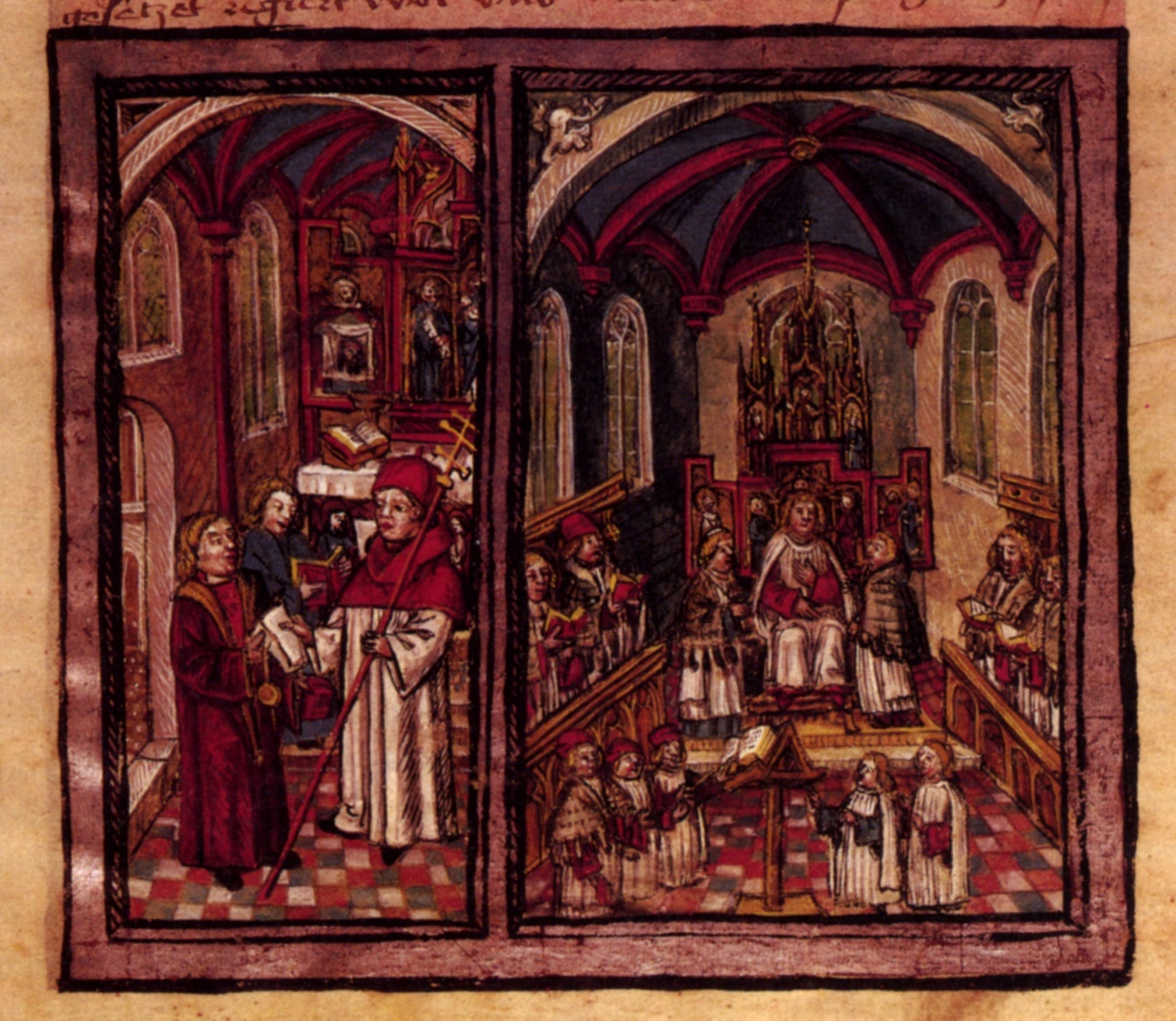 Konstanzer Bistumsstreit von 1474, abgebildet in Diebold Schillings Schweizer Bilderchronik, 1513. Zentralbibliothek Luzern. Links: Ludwig von Freyberg empfängt das Ernennungsschreiben des Papsts Sixtus IV; Rechts: Otto von Sonnenberg wird vom Domkapitel auf den Altar gesetzt.